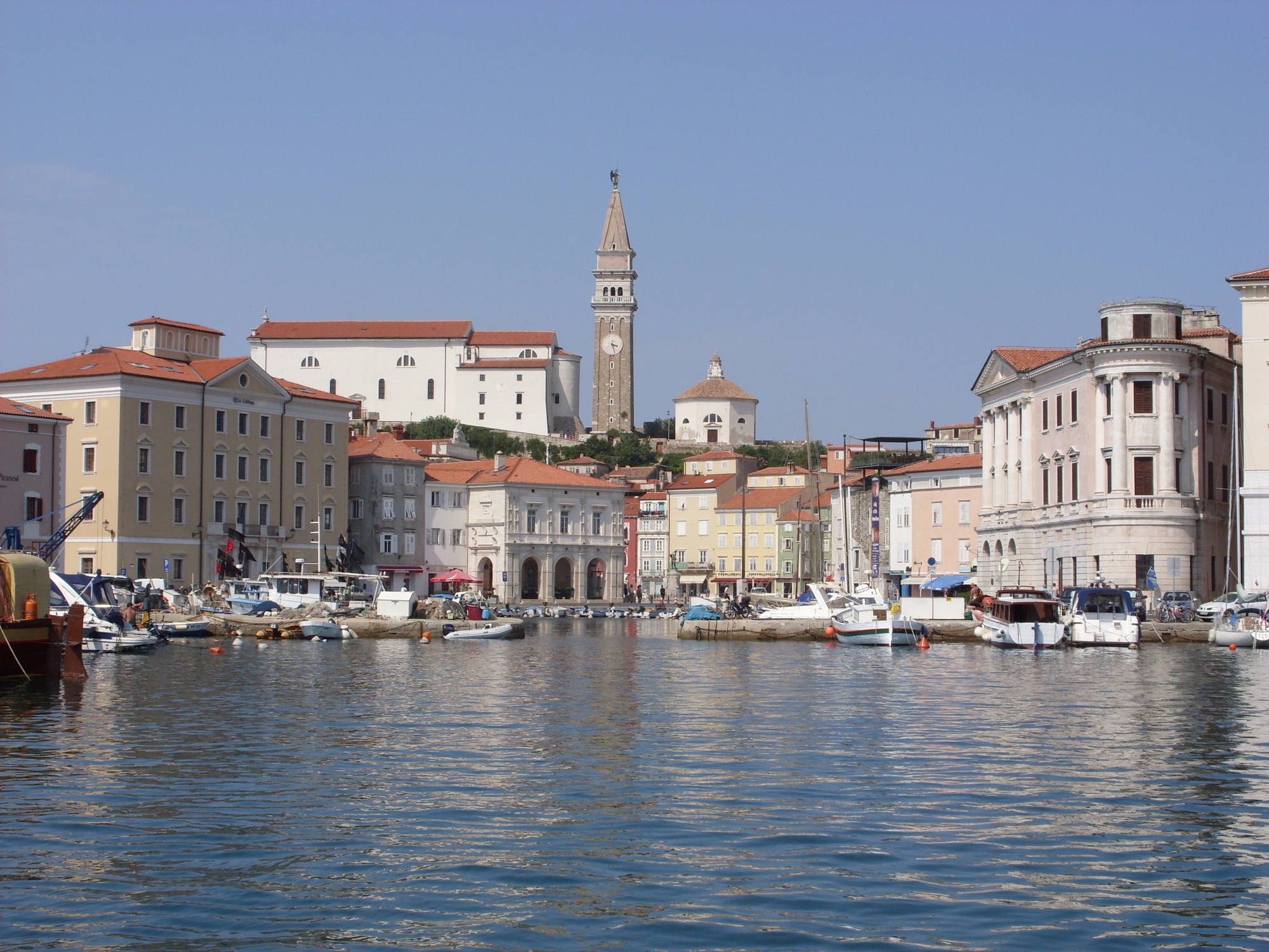 Blick über den Hafen auf die Altstadt von Piran (Slowenien). Hornjoserbsce: Pohlad přez přistaw na stare město Pirana (Słowjenska).